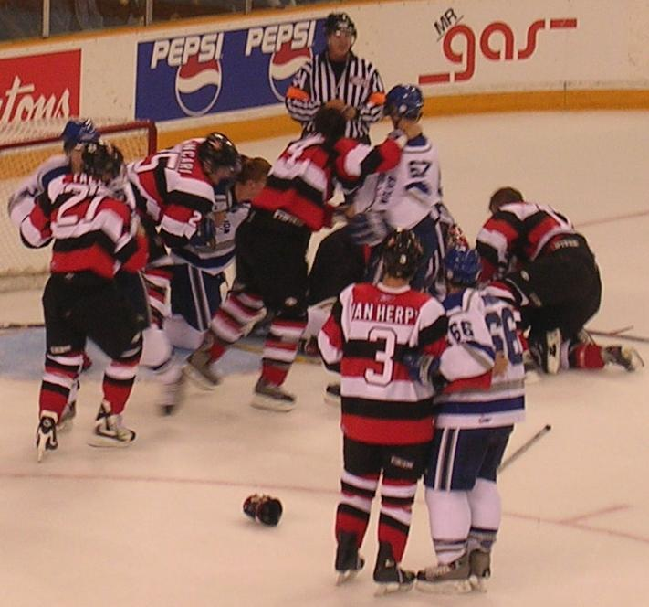 Foto do usuário Earl Andrew, que o lançou no domínio público na wikipédia inglesa, sob a tag PD-self. Pode ser encontrada aqui